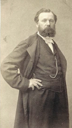 ArtistPhotographie de Pierre Petit (1831-1909)TitleJules Noël (peintre 1810-1881)Current location Musée d'Orsay Native nameMusée d'OrsayLocationParisCoordinates48° 51′ 36″ N, 2° 19′ 37″ E Established1986Website control VIAF: 130307757 ISNI: 0000 0001 2157 2575 ULAN: 500310001 LCCN: n84128587 NLA: 36024323 GND: 006672892/667289-9 SUDOC: 027980227 BNF: 11990767x Museofile: M5060 NDL: 00359473 Source/PhotographerRéunion des musées nationaux This work is in the public domain in its country of origin and other countries and areas where the copyright term is the author's life plus 70 years or less. You must also include a United States public domain tag to indicate why this work is in the public domain in the United States. Note that a few countries have copyright terms longer than 70 years: Mexico has 100 years, Jamaica has 95 years, Colombia has 80 years, and Guatemala and Samoa have 75 years. This image may not be in the public domain in these countries, which moreover do not implement the rule of the shorter term. Côte d'Ivoire has a general copyright term of 99 years and Honduras has 75 years, but they do implement the rule of the shorter term. Copyright may extend on works created by French who died for France in World War II (more information), Russians who served in the Eastern Front of World War II (known as the Great Patriotic War in Russia) and posthumously rehabilitated victims of Soviet repressions (more information). This file has been identified as being free of known restrictions under copyright law, including all related and neighboring rights.